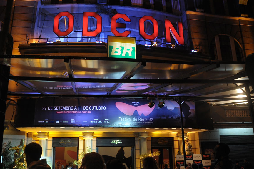 O Festival do Rio apresentou 400 filmes de mais de 60 países, exibidos em salas, arenas, praças e até na praia Foto: André Gomes de Melo migre.me/cz09Y